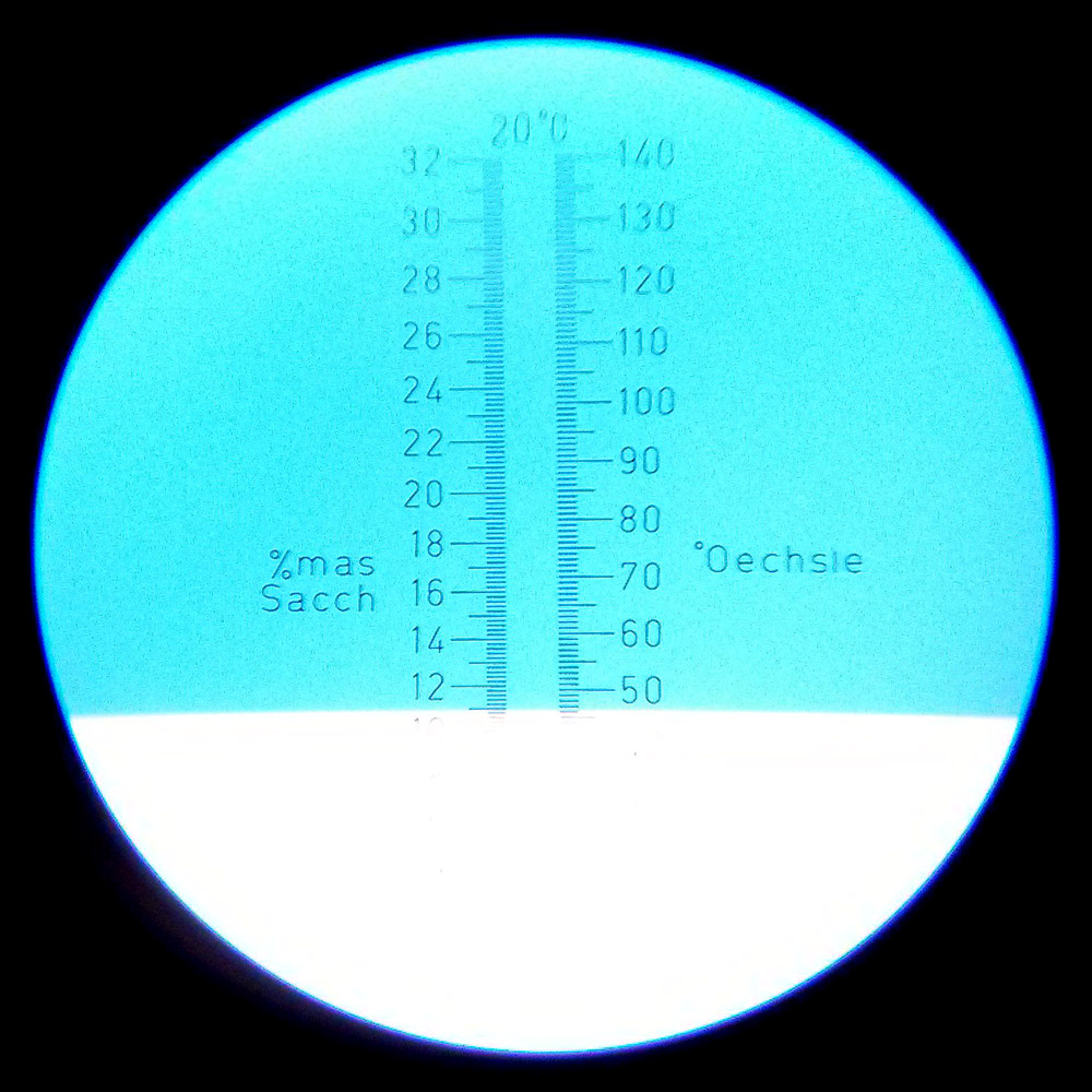 Blick durch das Okular eines Handrefraktometers mit fixer Arbeitstemperatur (20 °C) bei der Analyse des Oechsle-Wertes einer frisch gepflückten Weintraube. Ablesewert: 47 °Oechsle.